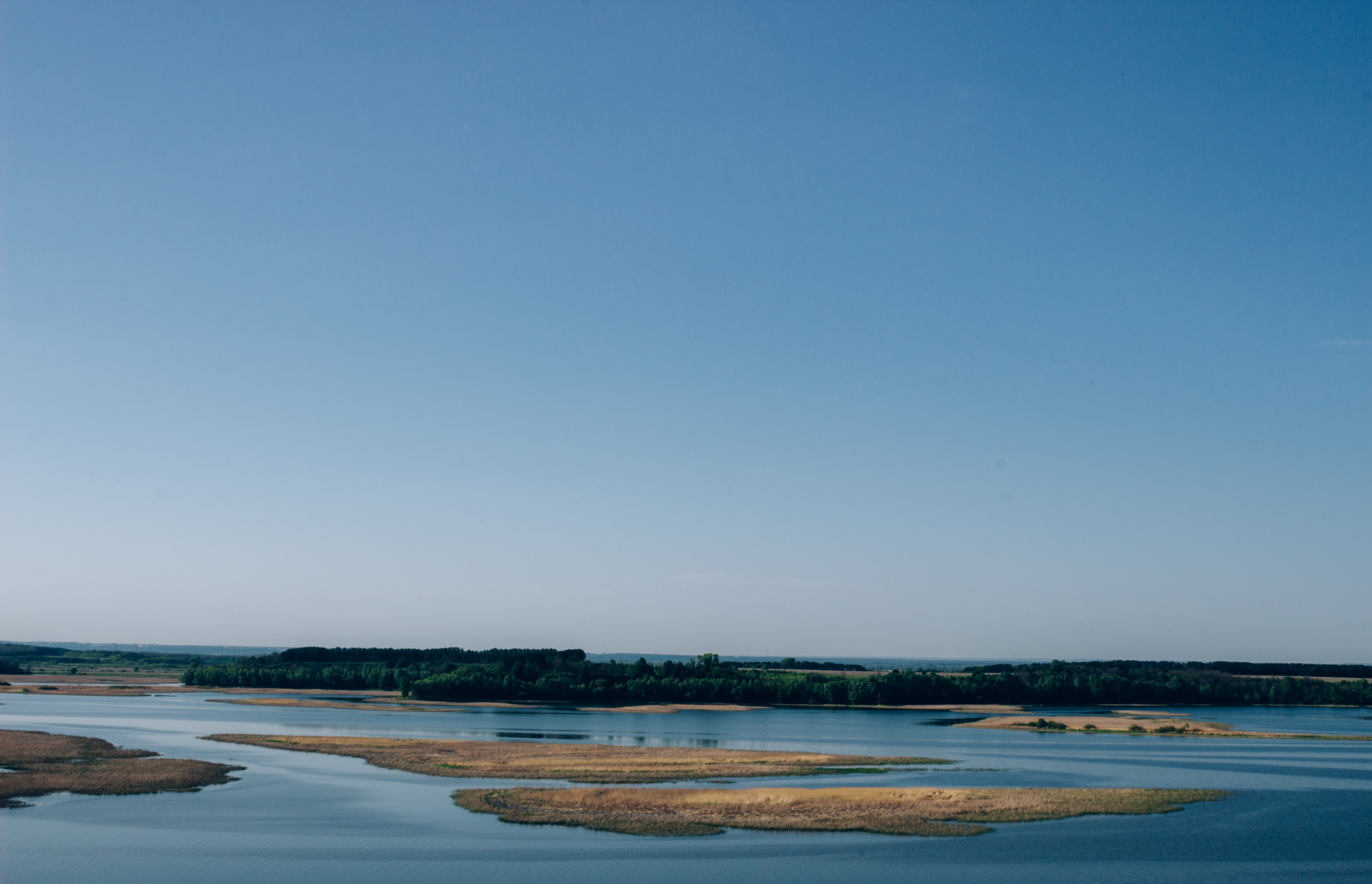 Свияжский заказник, Верхнеуслонский район This image is related to the protected area of Russia number 1610063